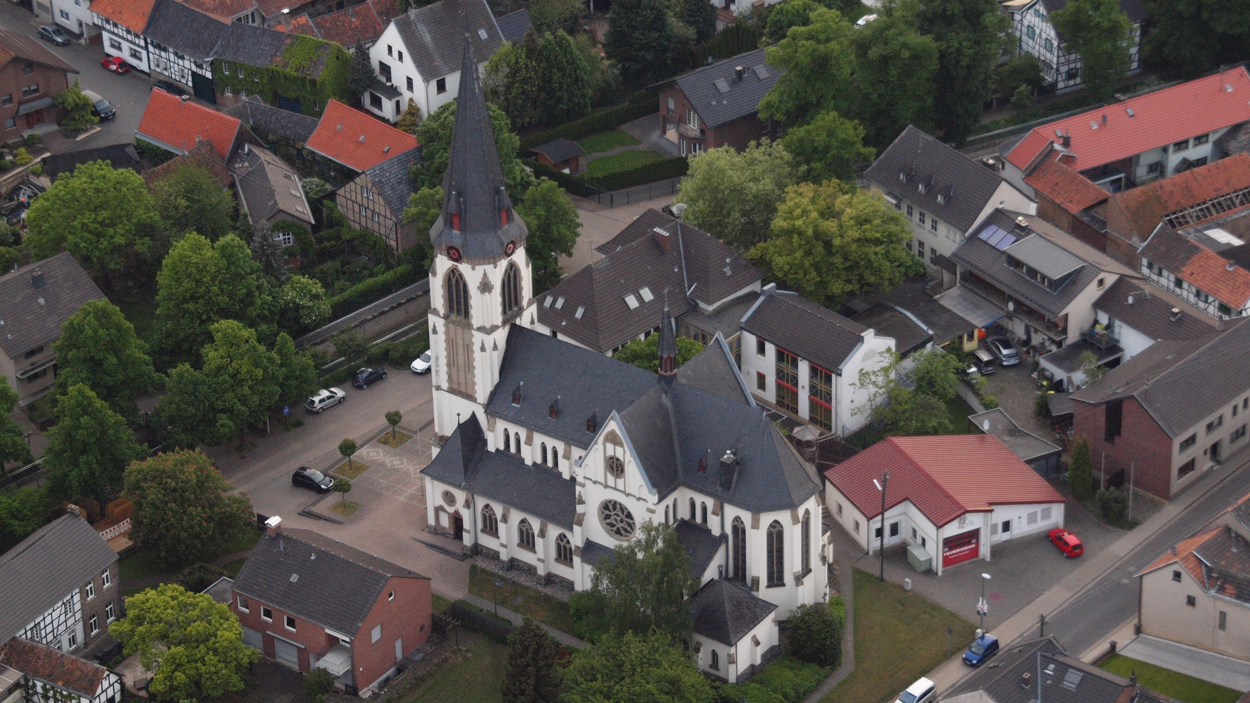 Katholische Pfarrkirche St. Martin, Flerzheim: Luftaufnahme (2014)